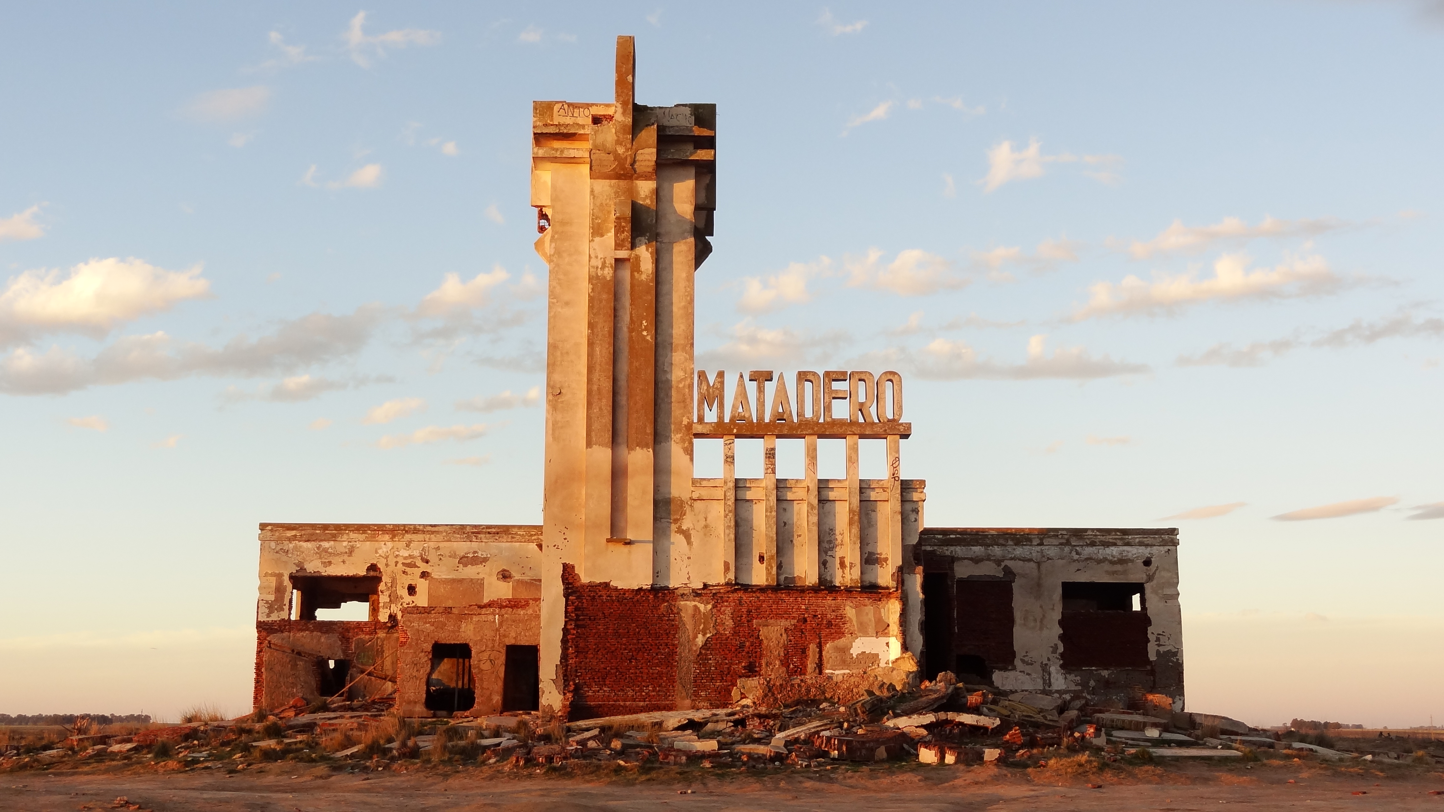 Antiguo Matadero de Epecuén, del arquitecto Salamone.